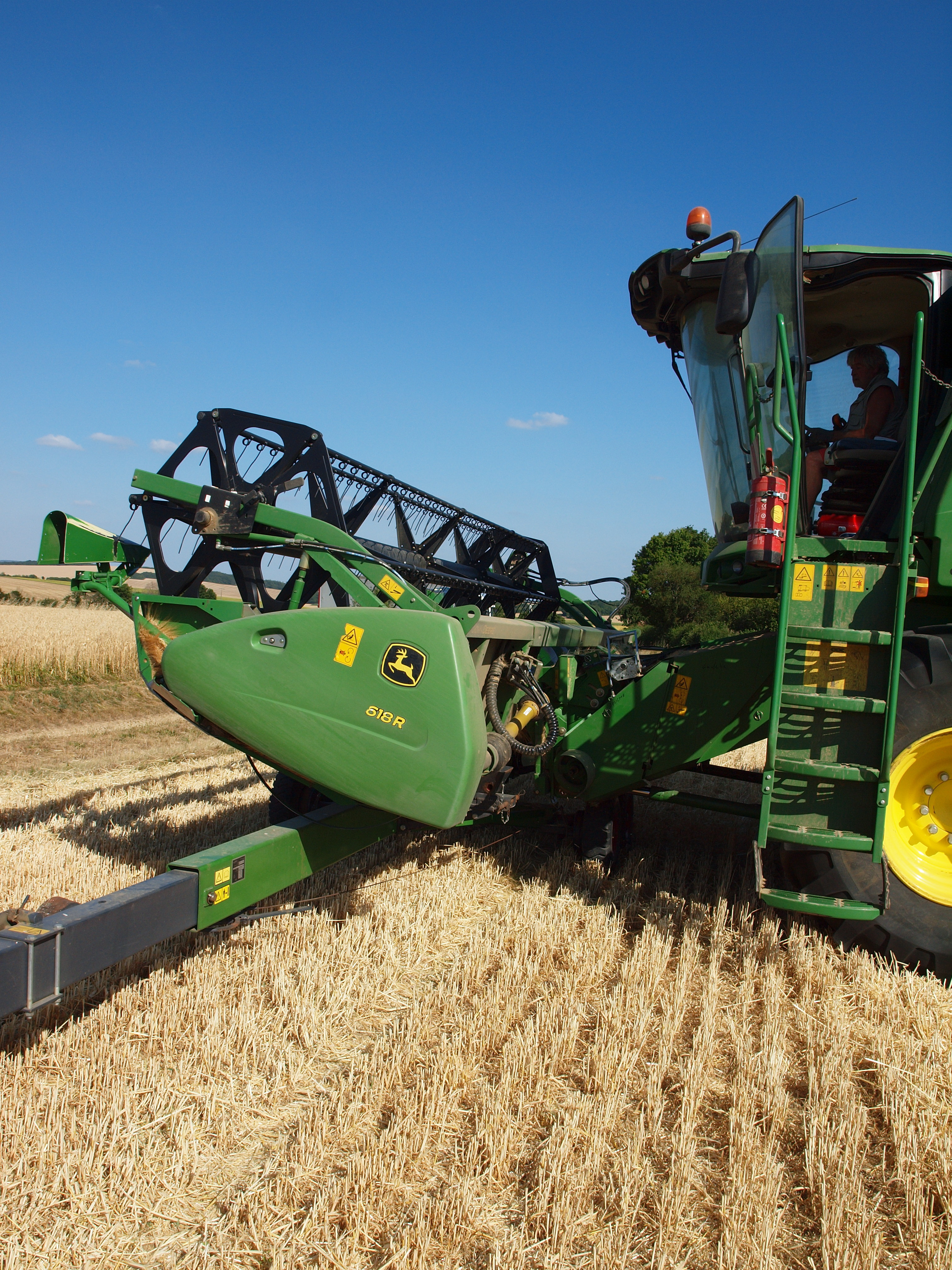 Thury (Yonne, France) ; dépose de la barre de coupe d'une moissonneuse-batteuse sur la chariot idoine (moisson des orges 2019)